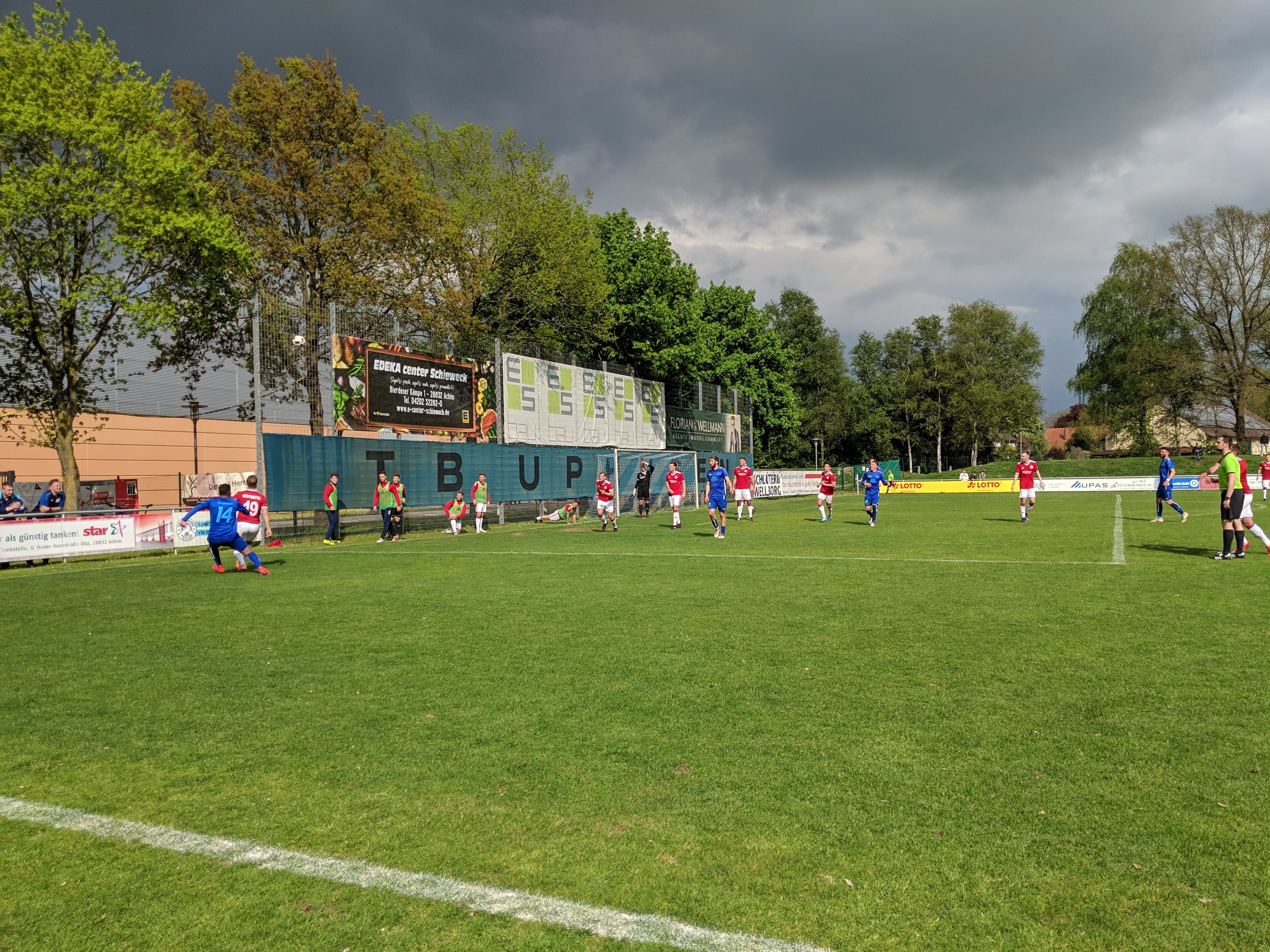 Blick auf den A-Sportplatz des Sportzentrum Uphusen, während der Partie TB Uphusen gegen den MTV Wolfenbüttel